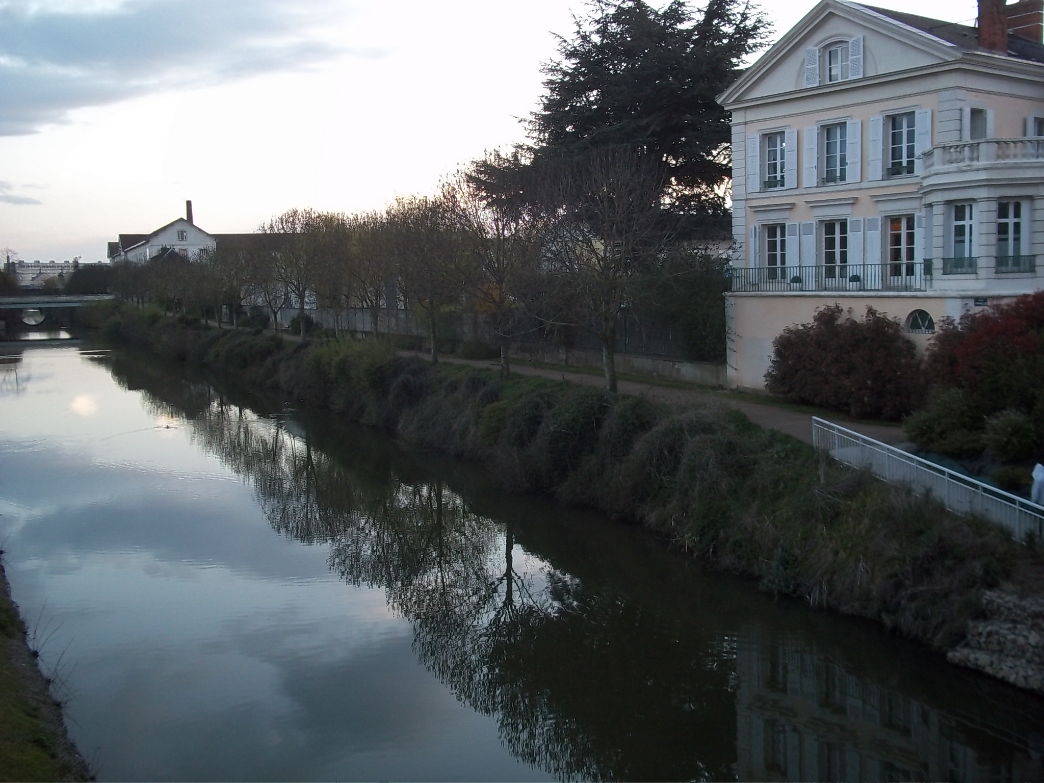 Le chemin de halage et le canal - Le Mans - France